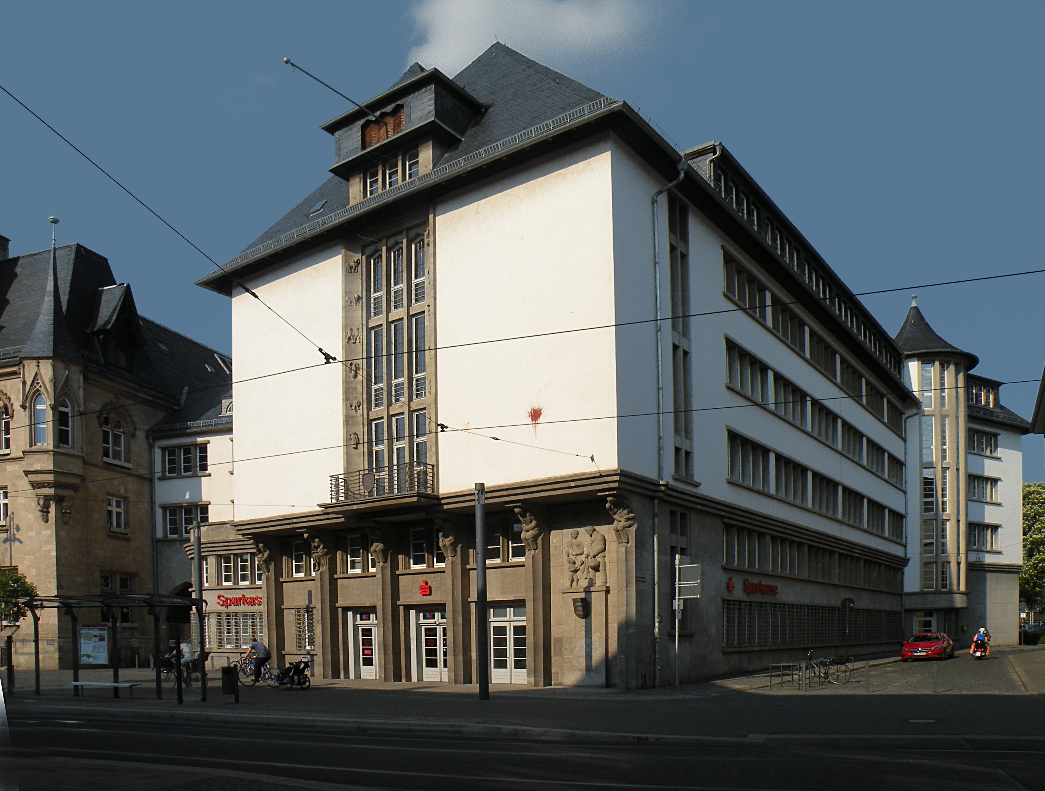 Здание сберкассы